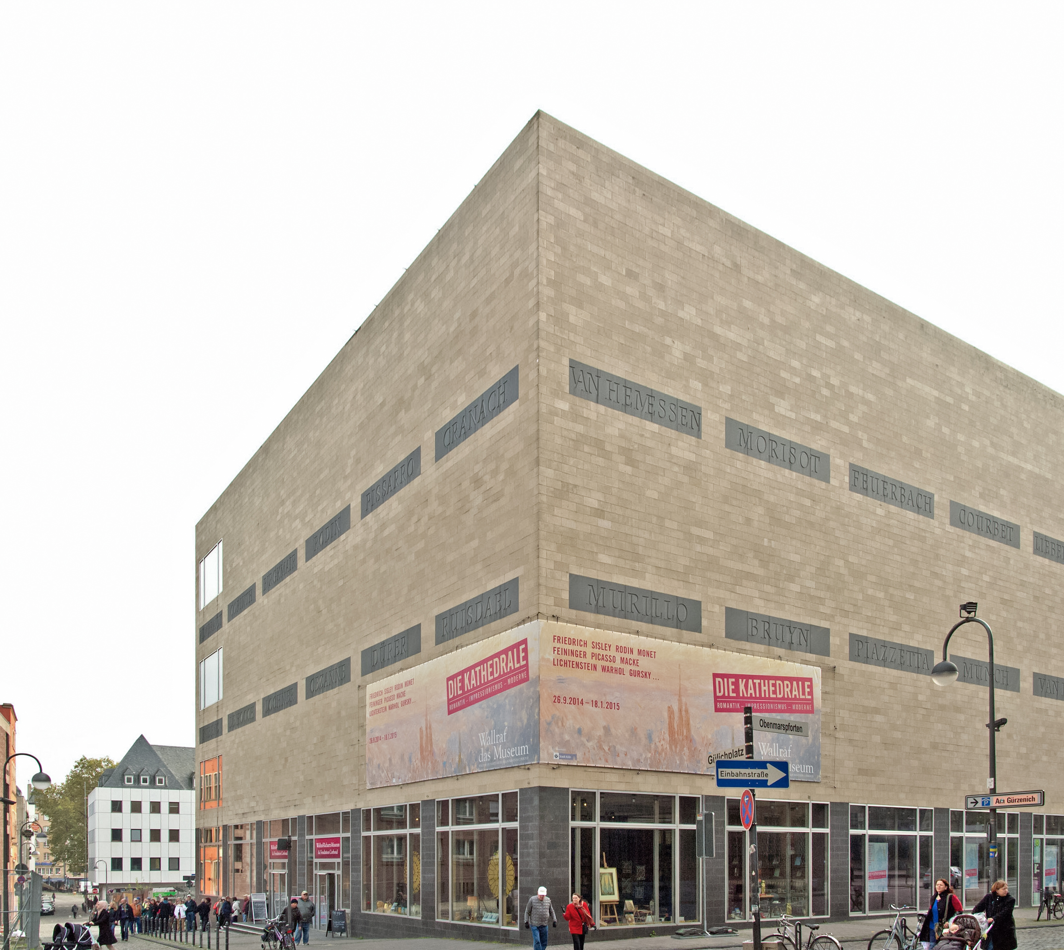 Frontansicht auf das Wallraf-Richartz-Museum & Foundation Corboud, aufgenommen im Oktober 2014. Das Banner bewirbt die zu dieser Zeit laufende Sonderausstellung "Die Kathedrale".